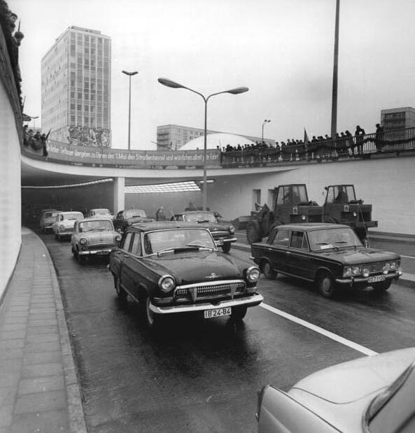 Zentralbild Junge 30.4.69 Berlin: Freie Fahrt unter dem Alex. Der neue 650 Meter lange Straßentunnel am Alexanderplatz wurde am 30.4.69 dem Verkehr übergeben. Der Tunnel, der in gut zwei Jahren nach modernsten verkehrstechnischen Gesichtspunkten errichtet wurde, bildet das Kernstück der neuen Verkehrslösung in Berlins Innenstadt. Der Alexanderplatz wird dadurch kreuzungsfrei.